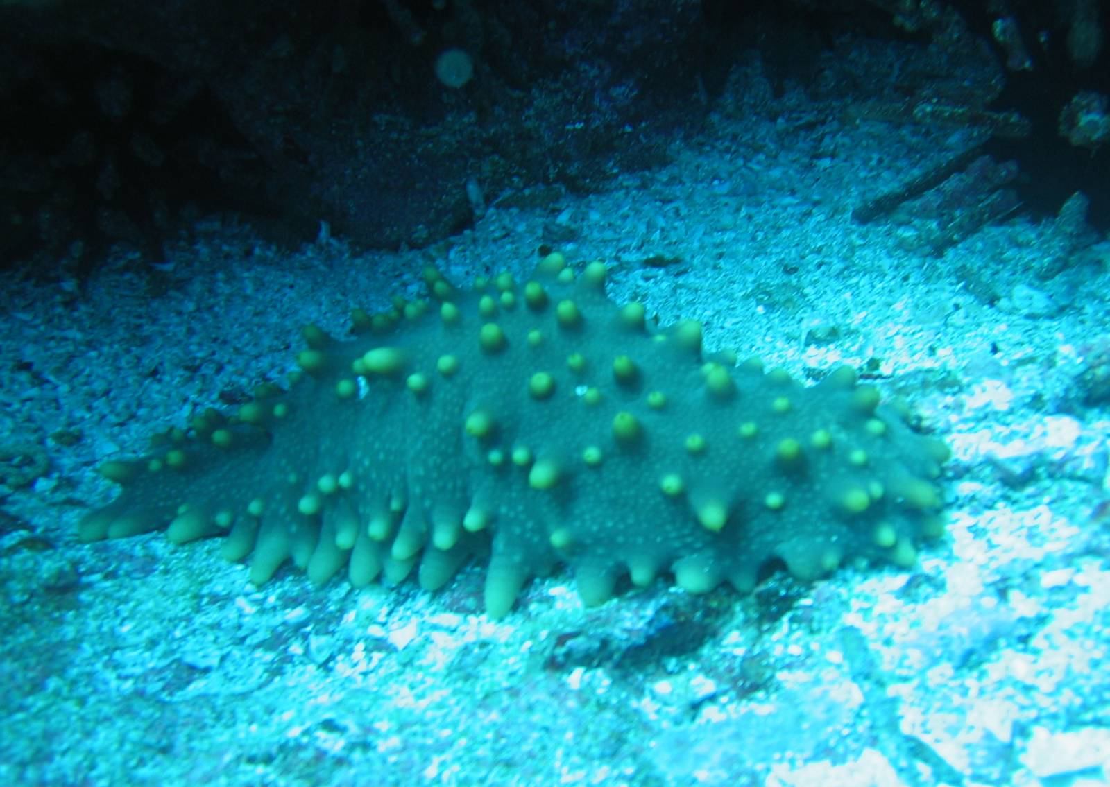 Seegurke (Isostichopus fuscus). Ort: An Insel Champion (nahe Insel Floreana/Galápagos/Ecuador)